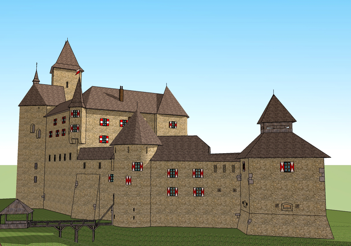 3D rekonstrukcija starega gradu Samobor s programom SketchUp